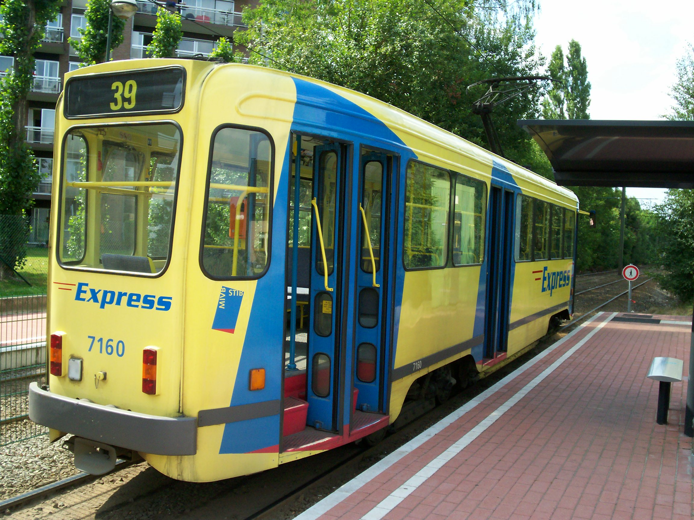 Un tram de type 7100 de la ligne 39 en station origine de Ban Eik et en direction de Montgomery